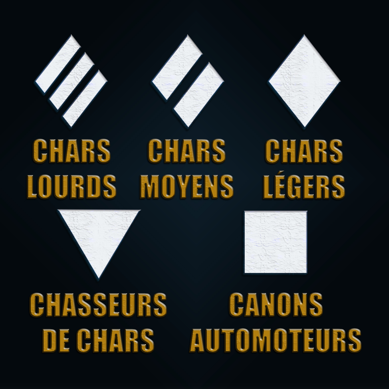 Logos des différents types de tanks du jeu World of Tanks